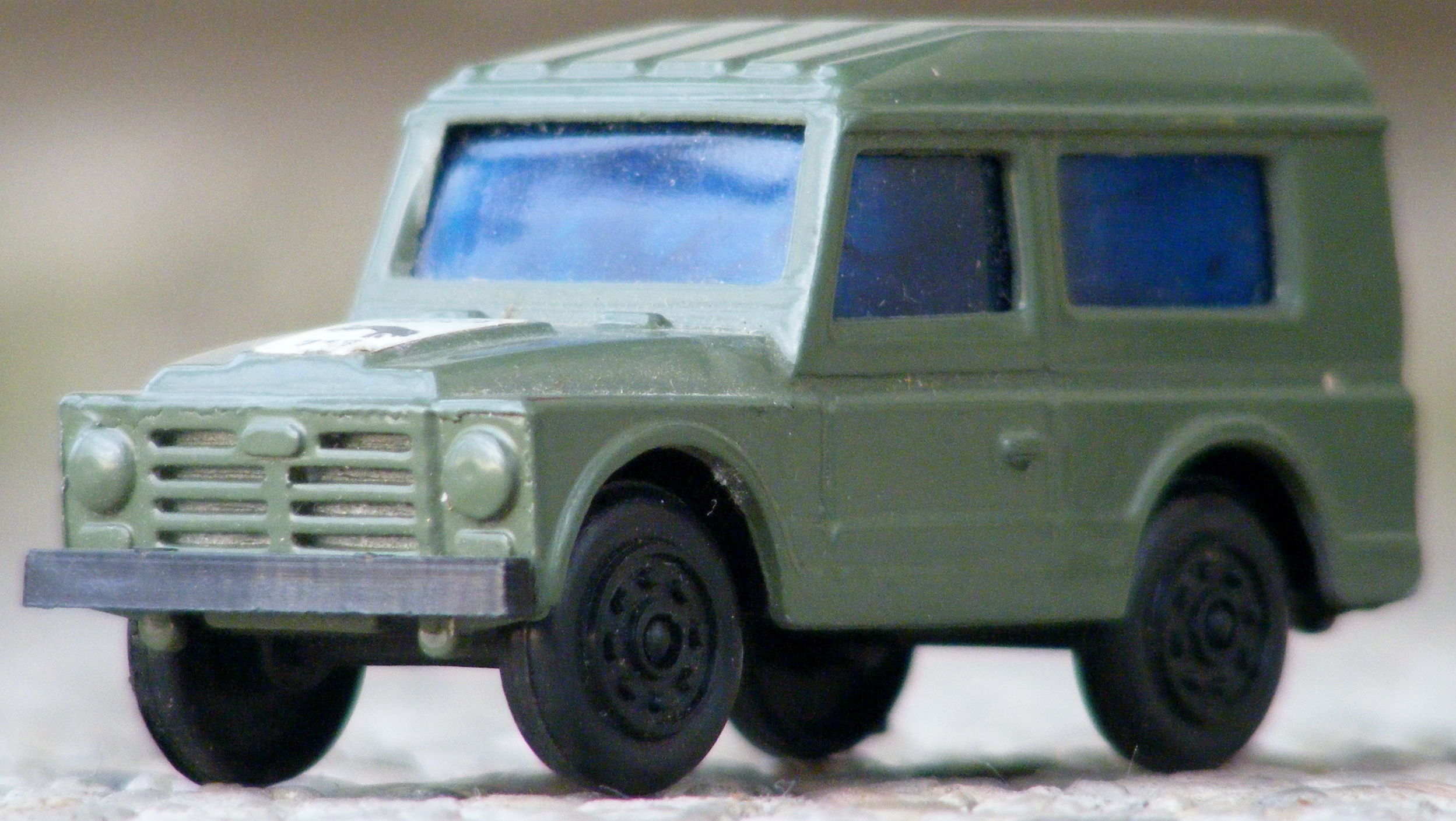 Mercury modelauto van een Fiat Campagnola